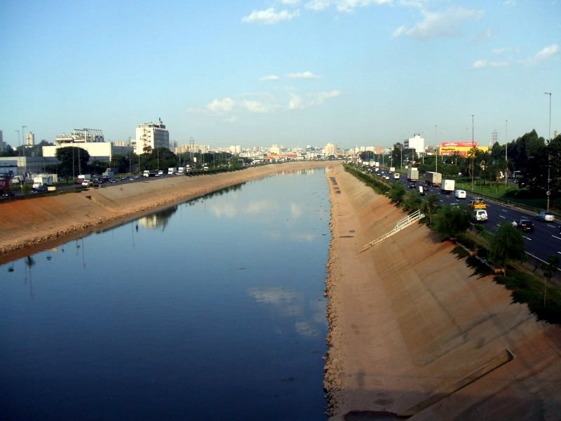 Marginal do Rio Tietê, vista da Ponte do Limão